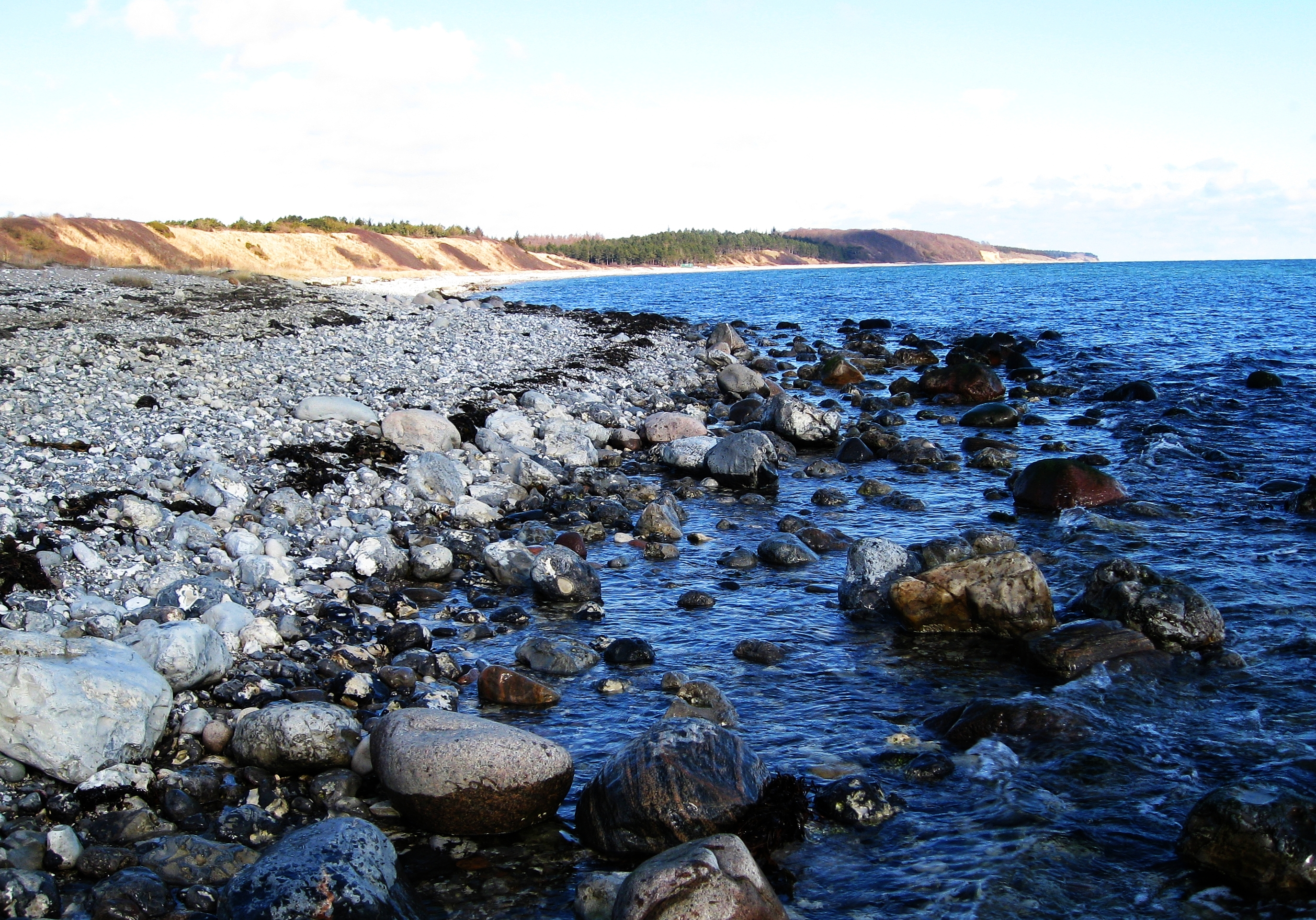 Glatved Strand total